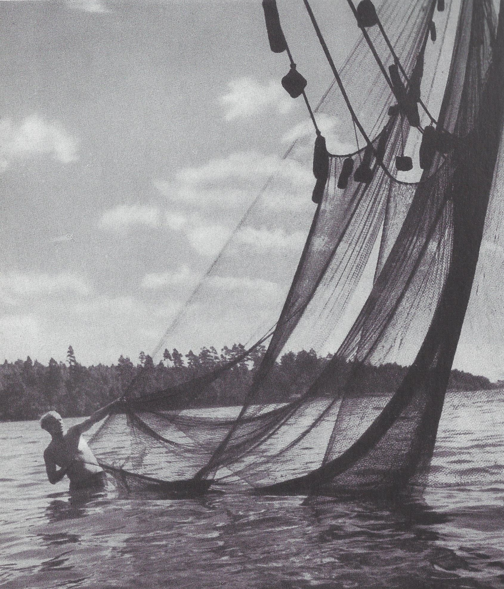 Fischernetze in Masuren